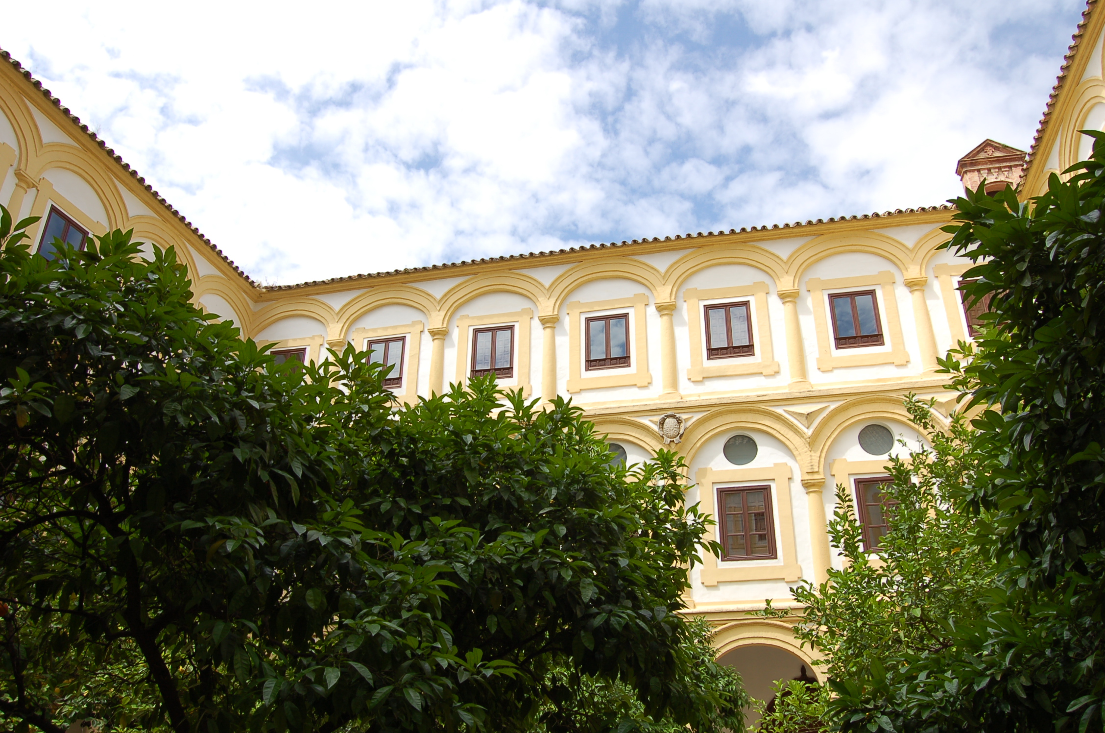 Córdoba (España).